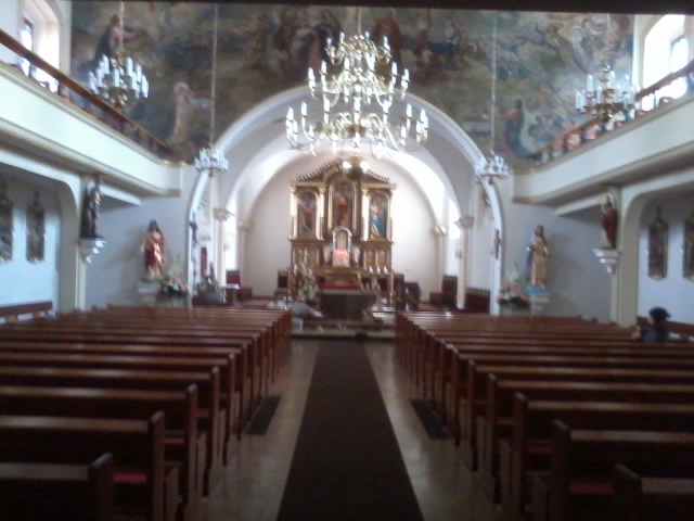 Kościół św. Bartłomieja Apostoła w Jełowej.